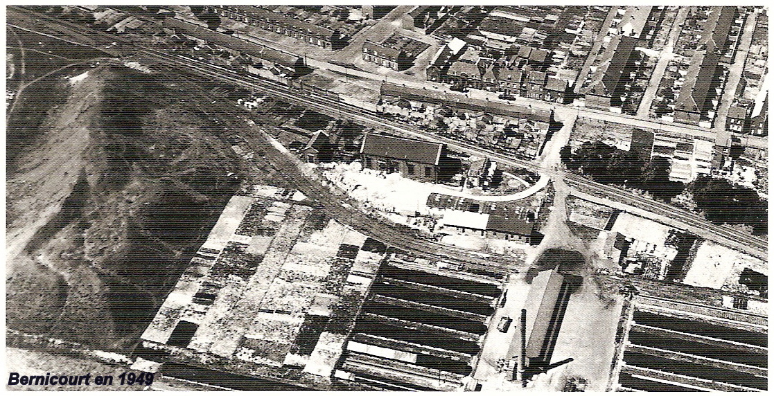 vue aérienne de Bernicourt en 1949